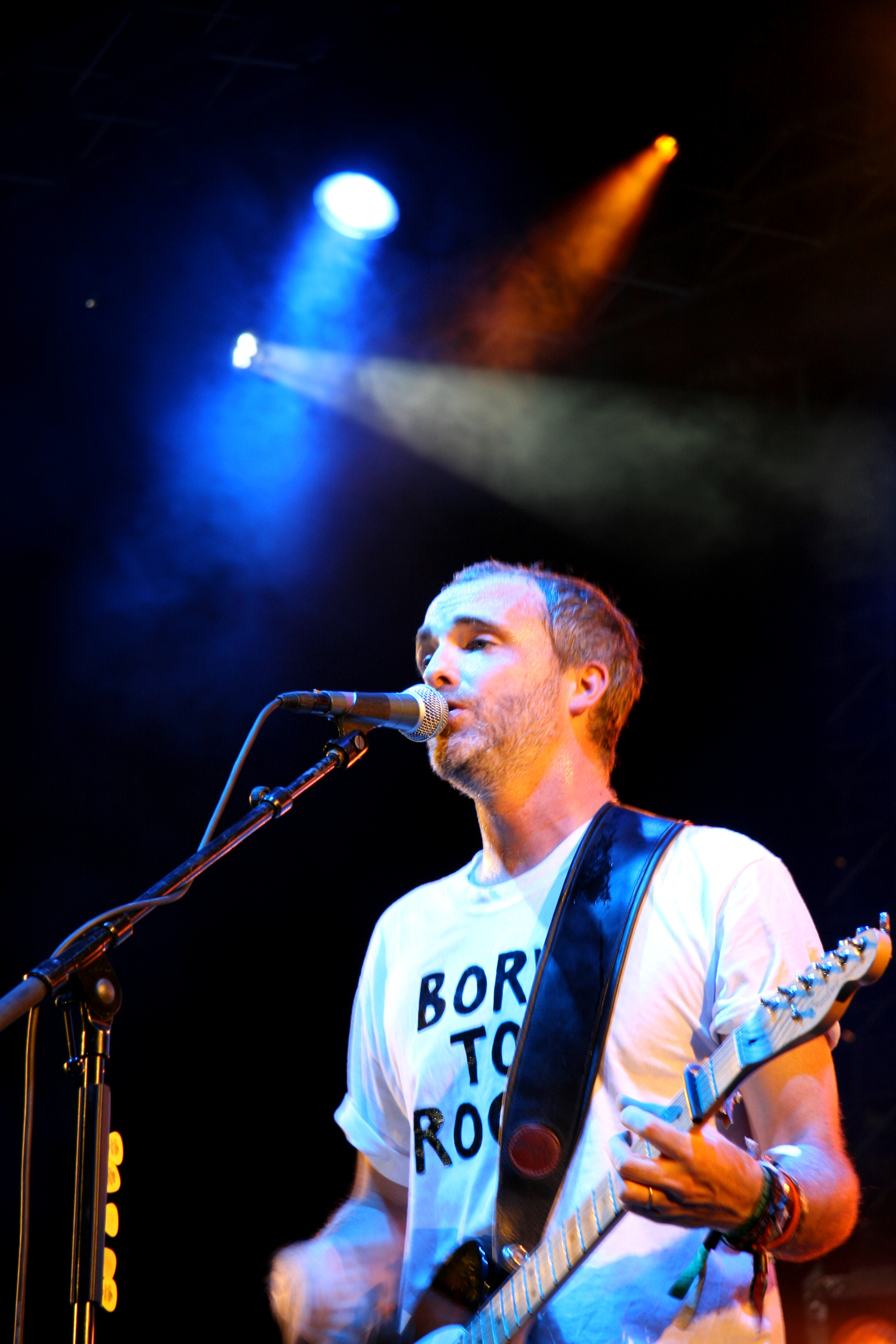 Francis Healy /Travis en la antigua Fábrica Damm de Barcelona